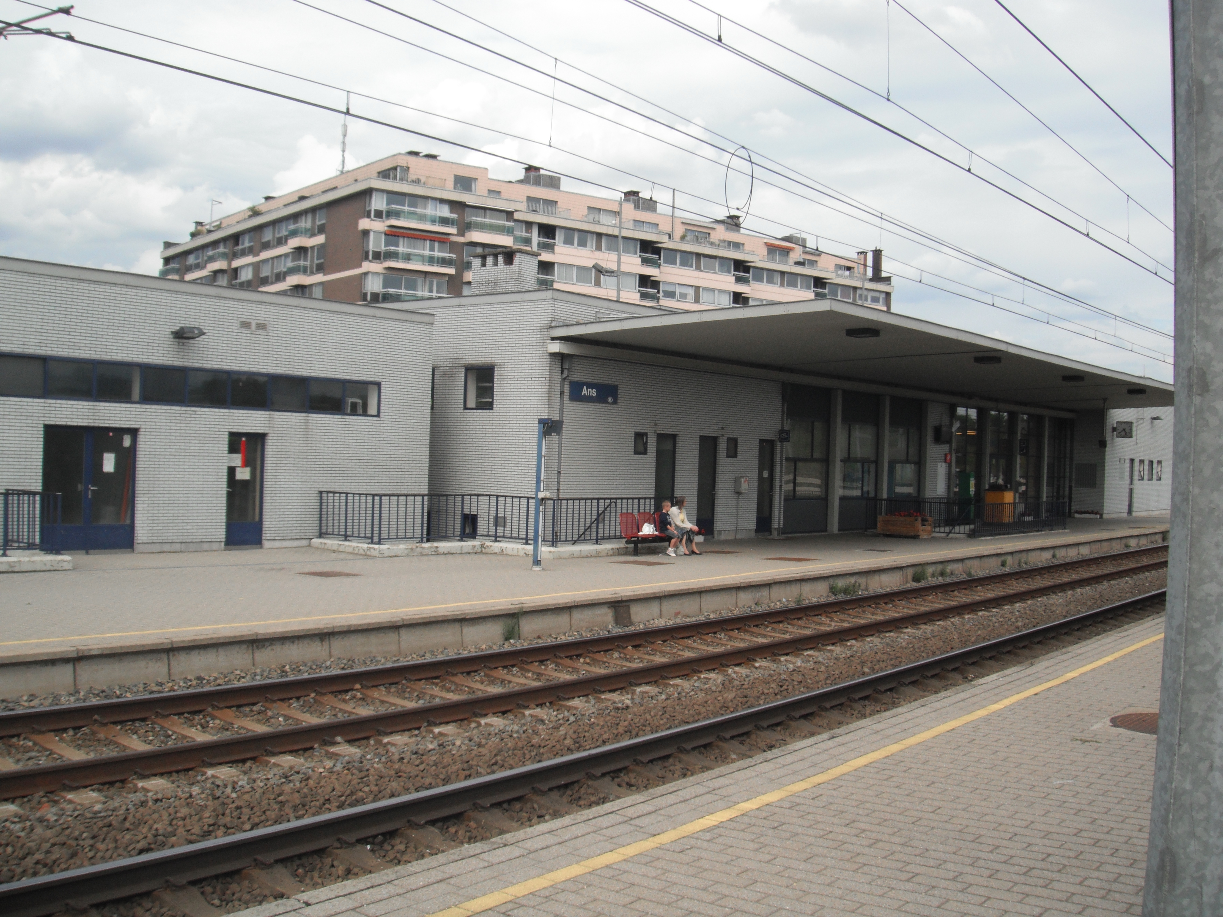 Rue de la Station, 85, Belgique